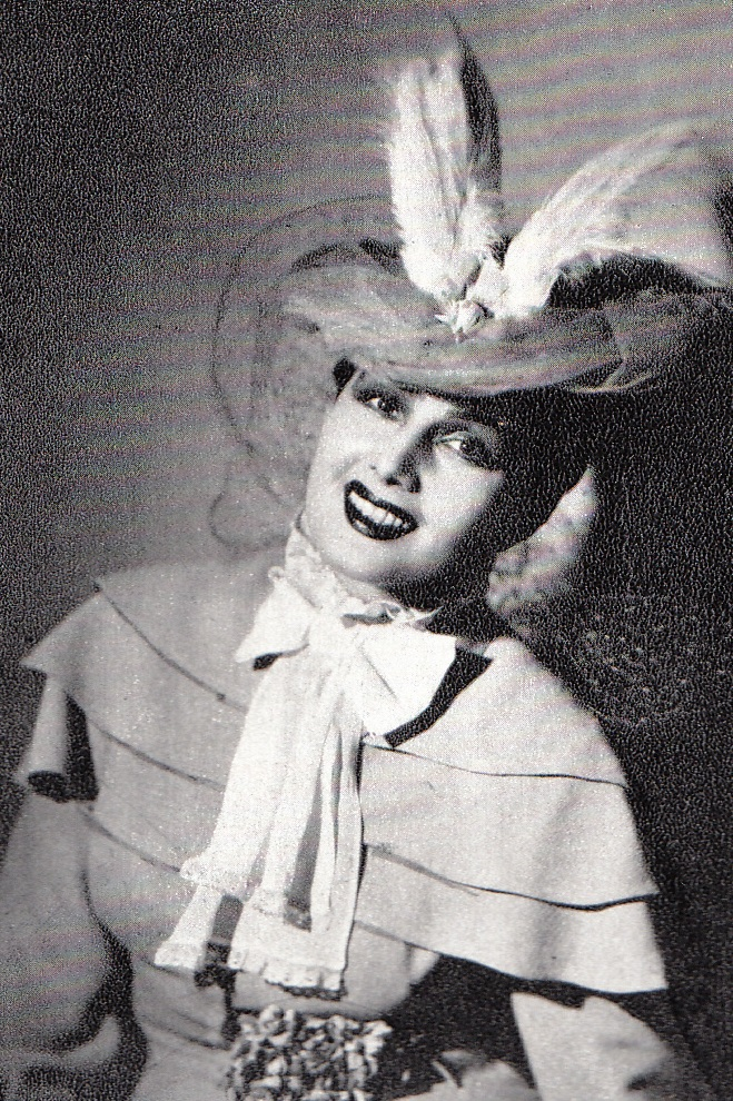 Tanți Cocea